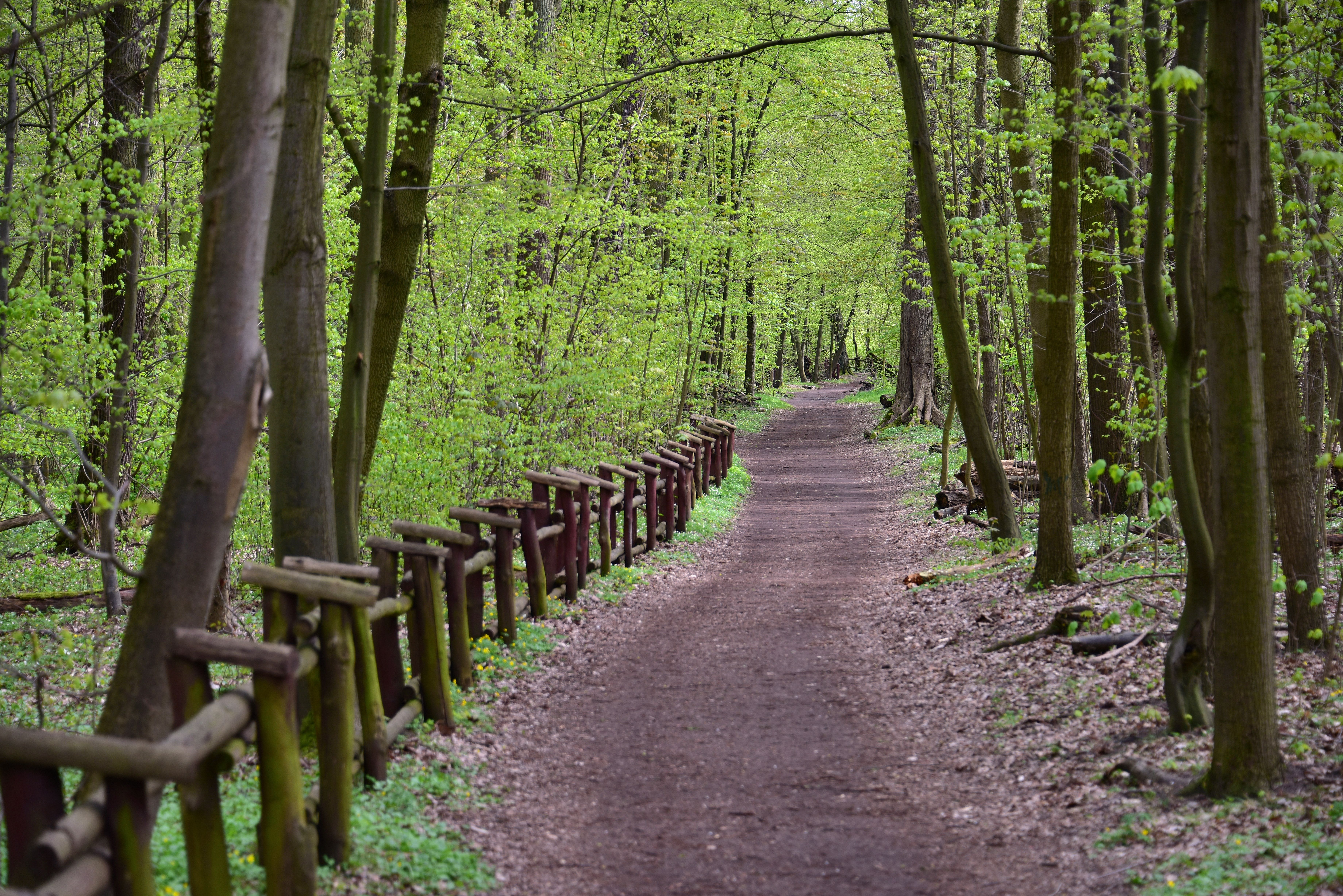 Rezerwat przyrody Las Bielański w Warszawie